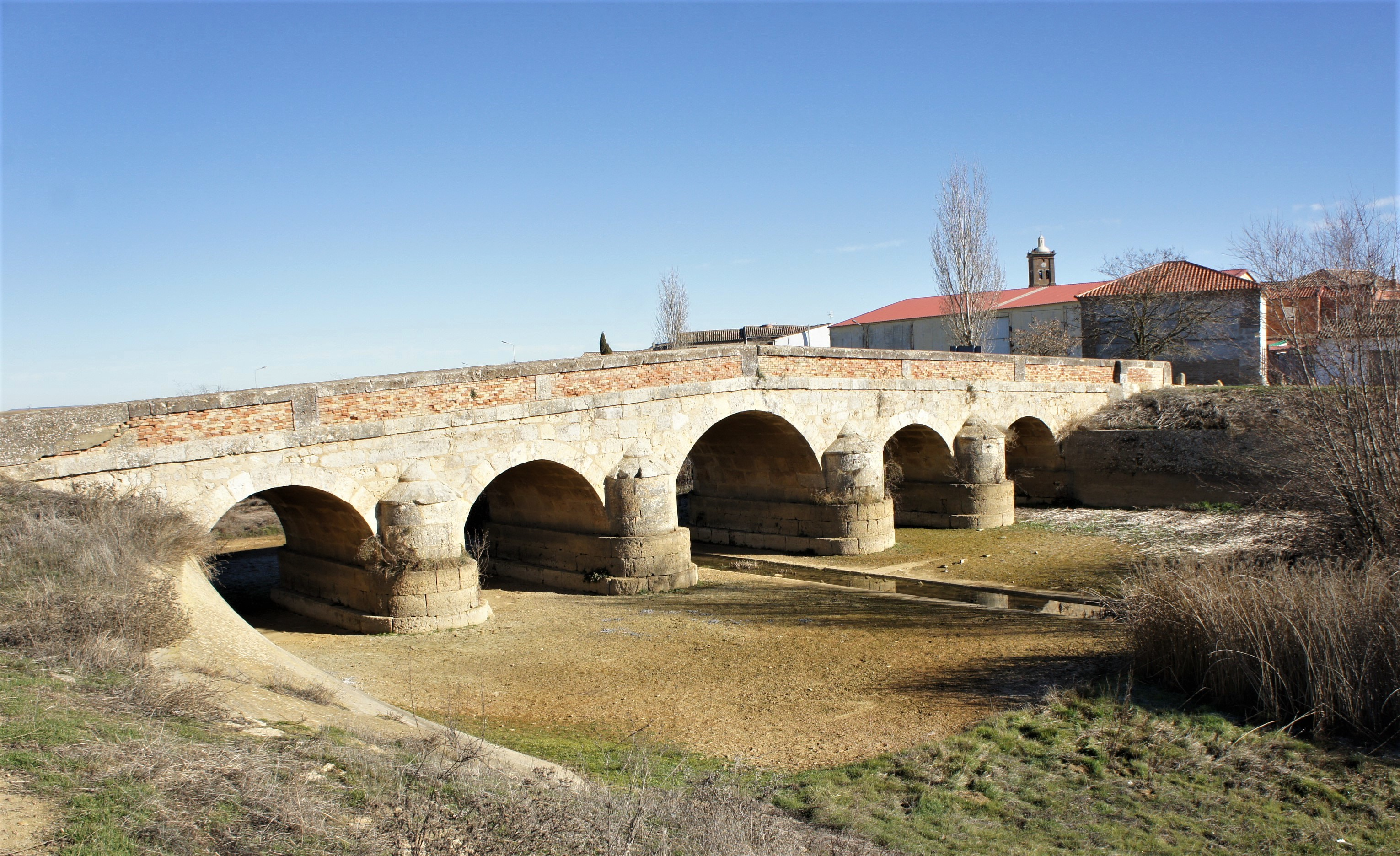 Becerril de Campos. Palencia